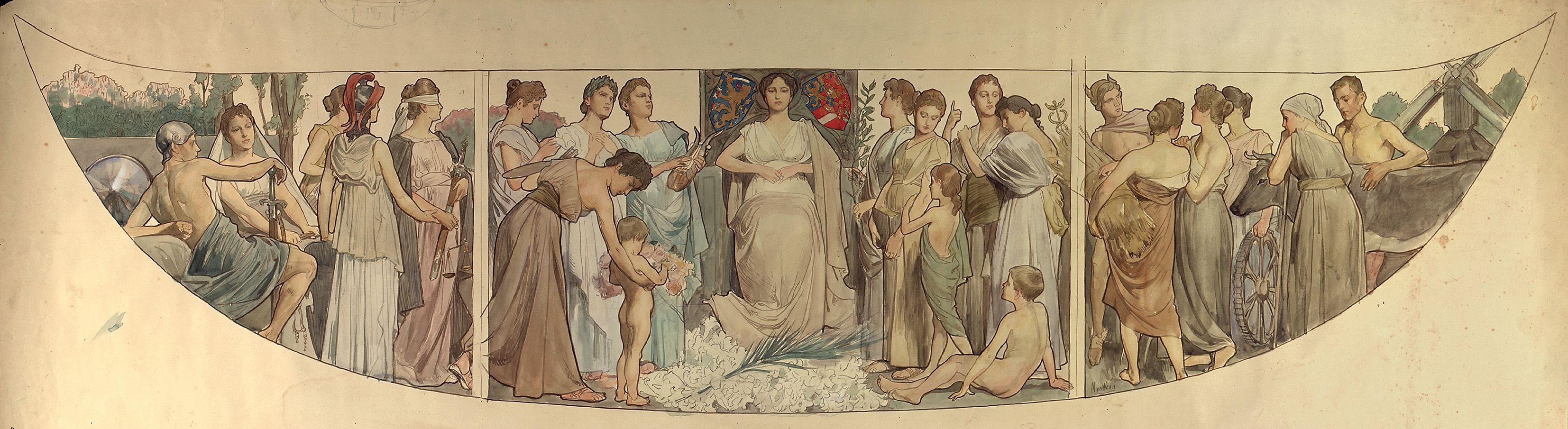 ontwerptekening voor paneel . Ontwerptekening door Nicolaas van der Waay voor de beschildering van de zijkant van de Gouden Koets, die samen met het ander zijpaneel het Heden verbeeldt. Het ontwerp voor de rechterkant stelt de hulde van Nederland voor: een jongetje dat 'jong Holland' symboliseert strooit lelies en rozen aan de voeten van de Nederlandse Maagd, terwijl personificaties de Nederlandse samenleving vertegenwoordigen.